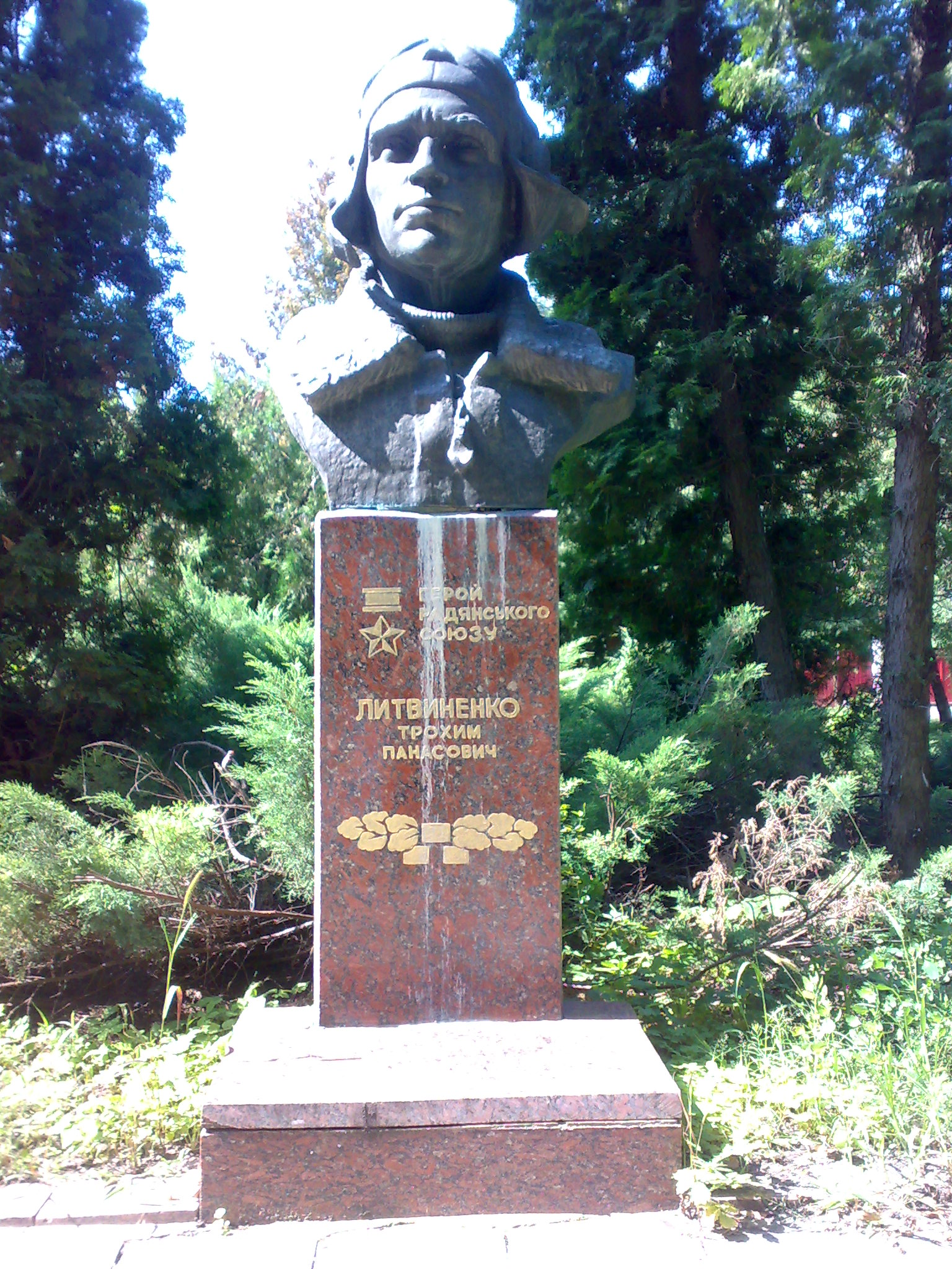 Пам'ятник герою Радянського Союзу миронівчанину Литвиненку Трохиму Панасовичу